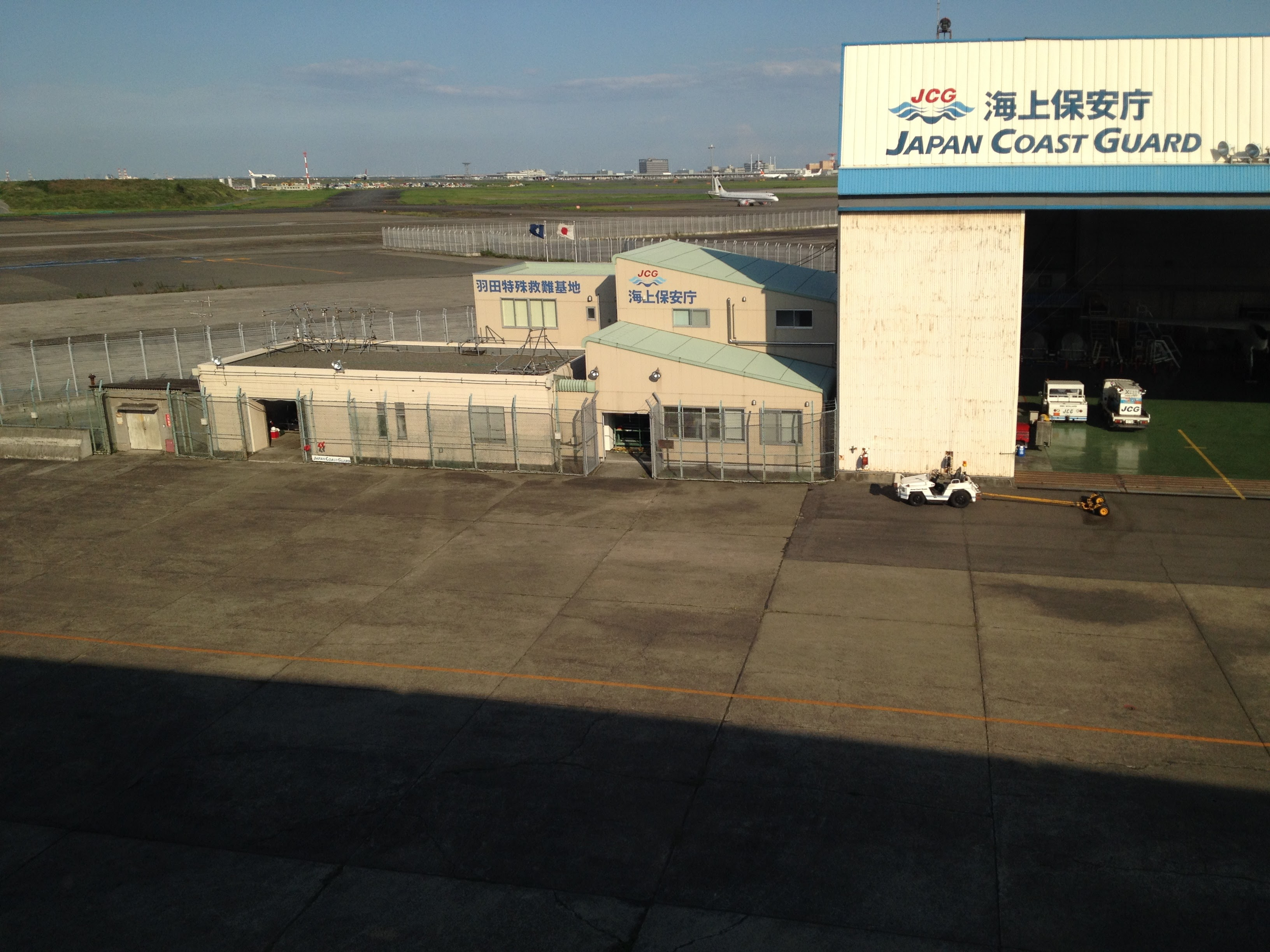 第三管区海上保安本部羽田特殊救難基地